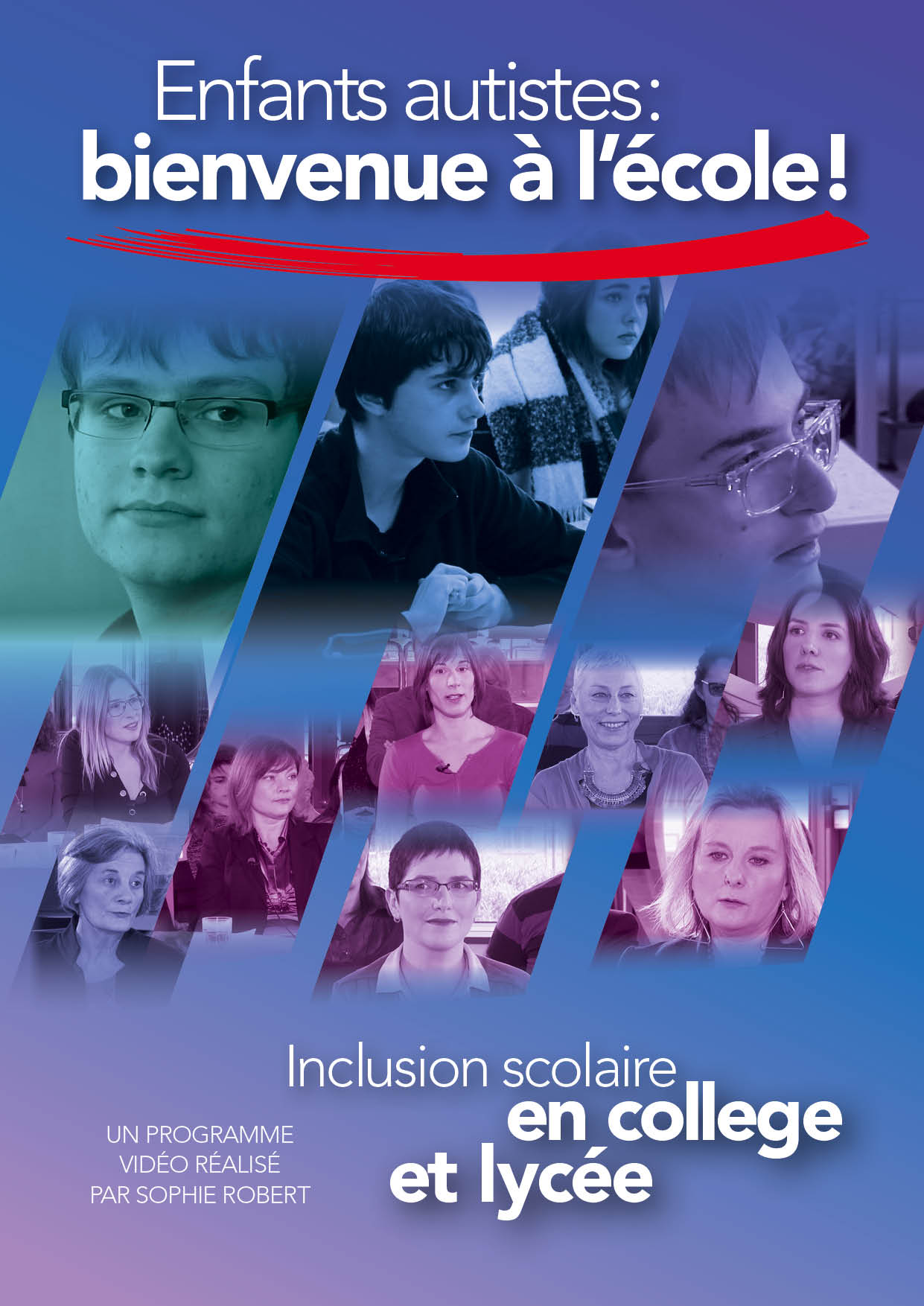 Affiche du programme vidéo réalisé par Sophie Robert sur l'inclusion scolaire des enfants autistes. La présente affiche se rapporte le volet 2 de la série "Enfants autistes: bienvenue à l'école", consacré à l'inclusion scolaire au collège et au lycée.